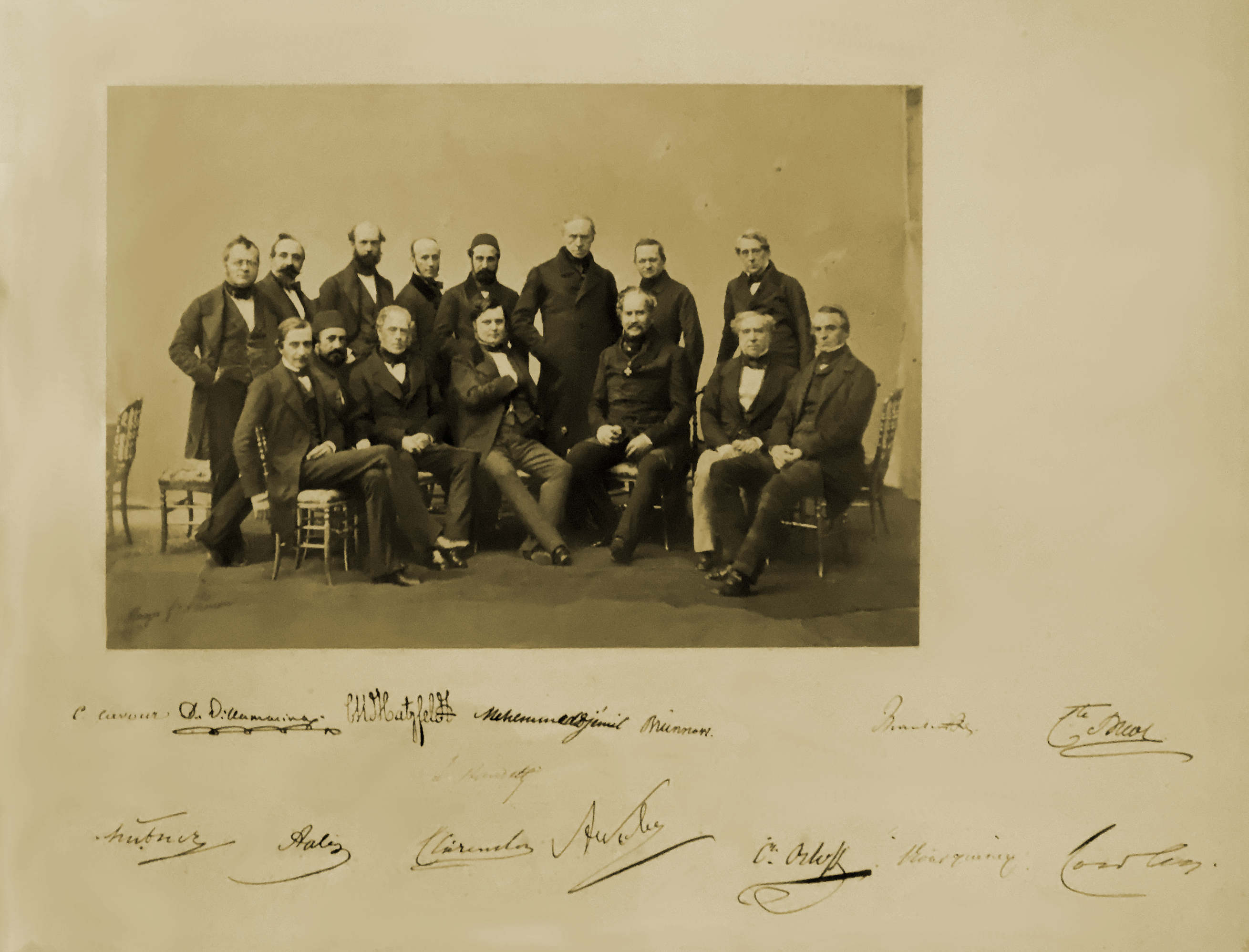 Les plénipotentiaires au congrès de Paris, 1856. Photographie Mayer Pierson, Paris. De gauche à droite : comte Cavour, marquis de Villamarina, comte de Hatzfeldt, Benedetti, Mohammed Djemil Pacha, baron de Brunnow, baron de Manteuffel, comte de Buol, baron de Hübner, Aali Pacha, comte de Clarendon, comte Walewski, comte Orloff, baron de Bourqueney, lord Cowley. Photographié au Musée national hongrois, Budapest